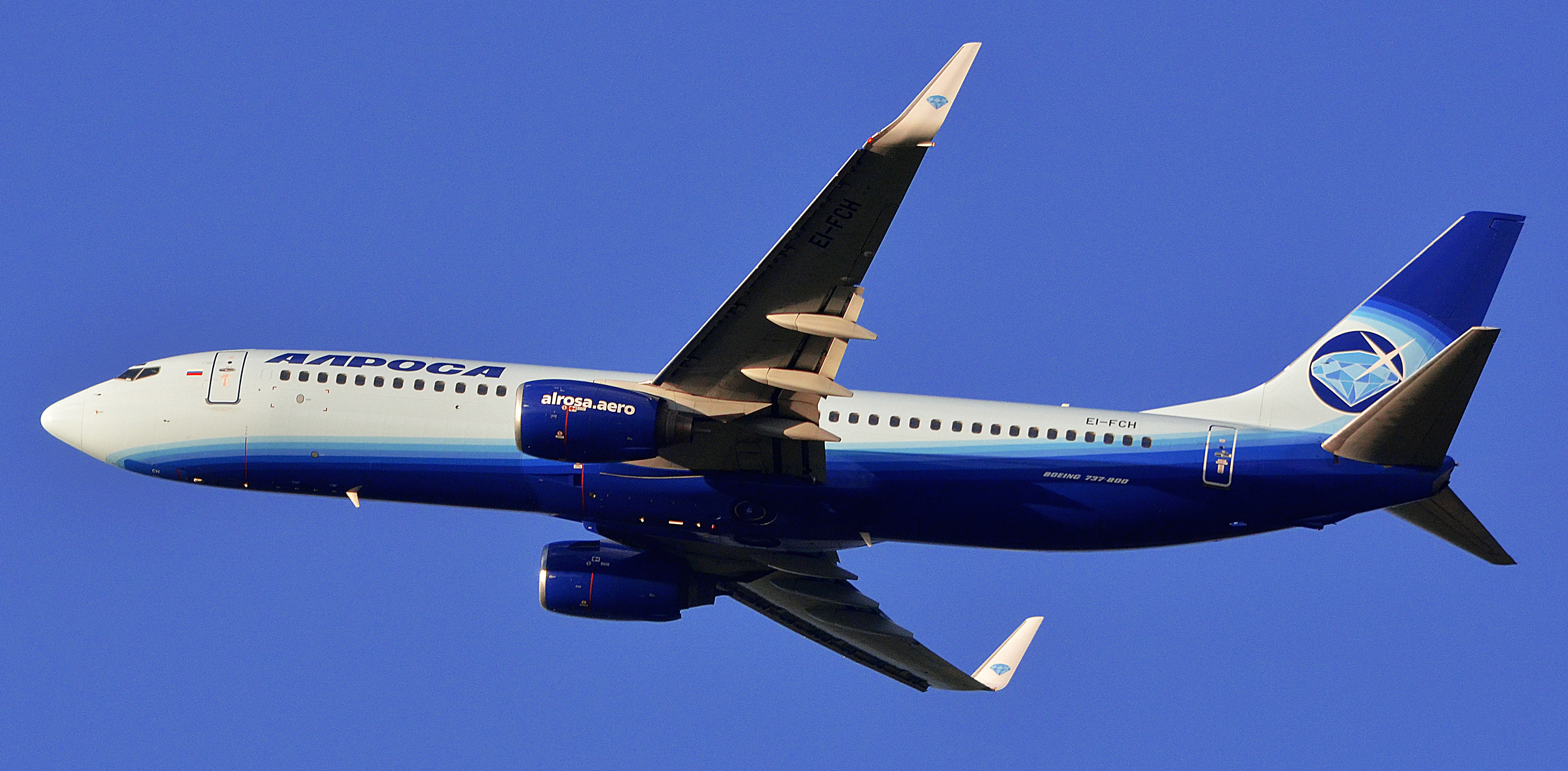 Можно увидеть здесь : You can see here